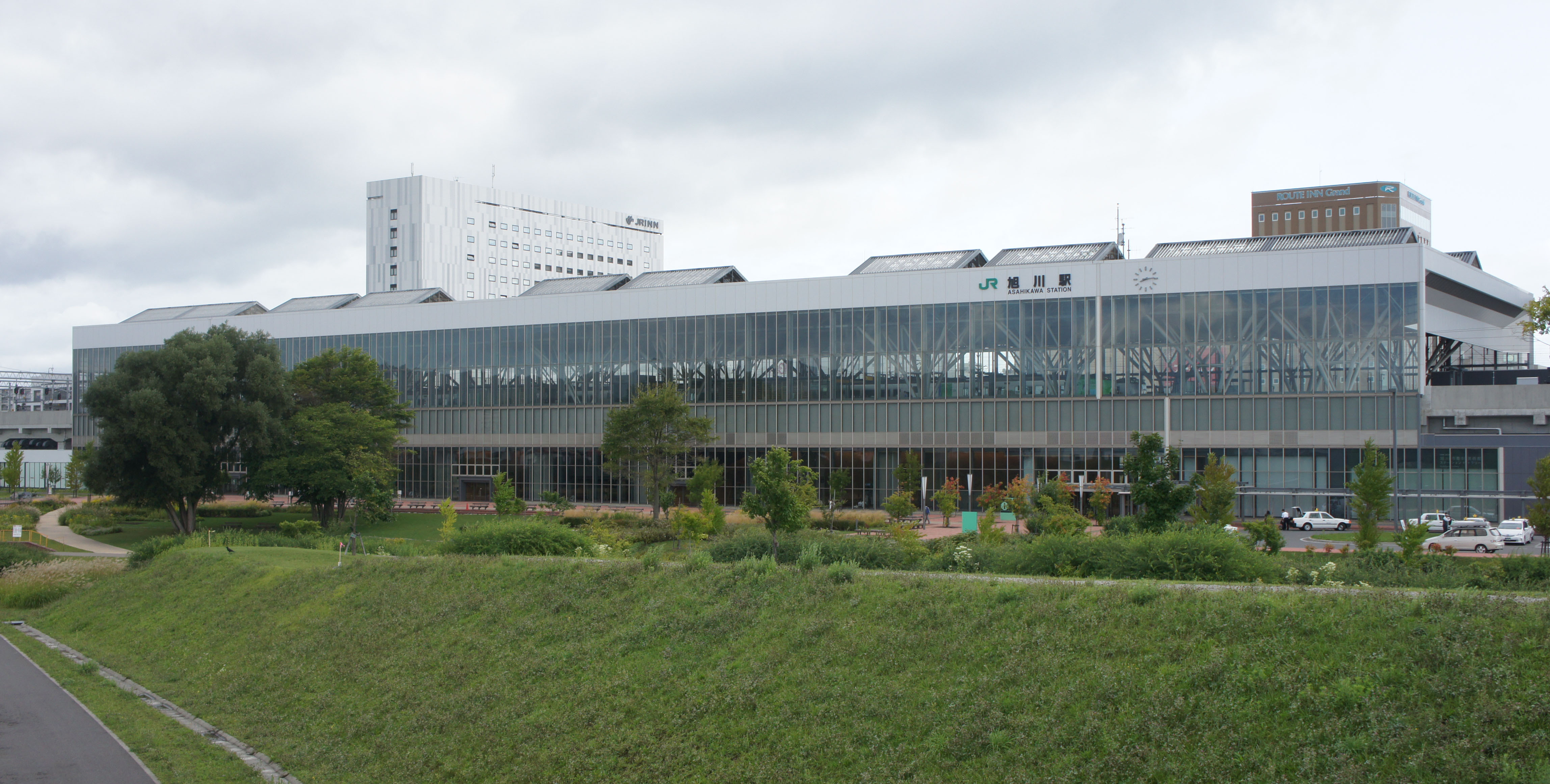 JR旭川駅の南口駅舎